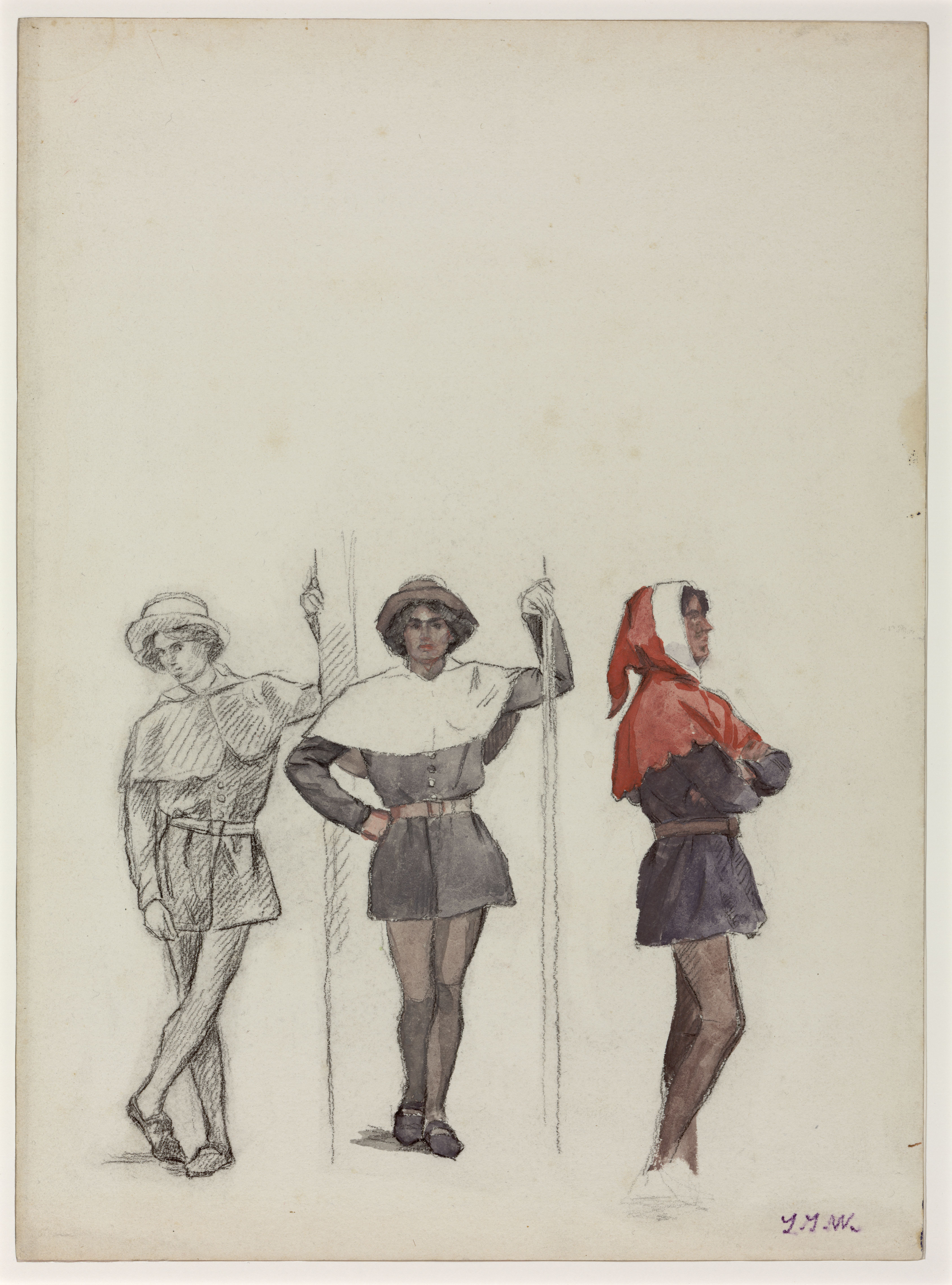 Etude pour la Foire du Lendit, fresque décorant la cour d'honneur de la nouvelle Sorbonne